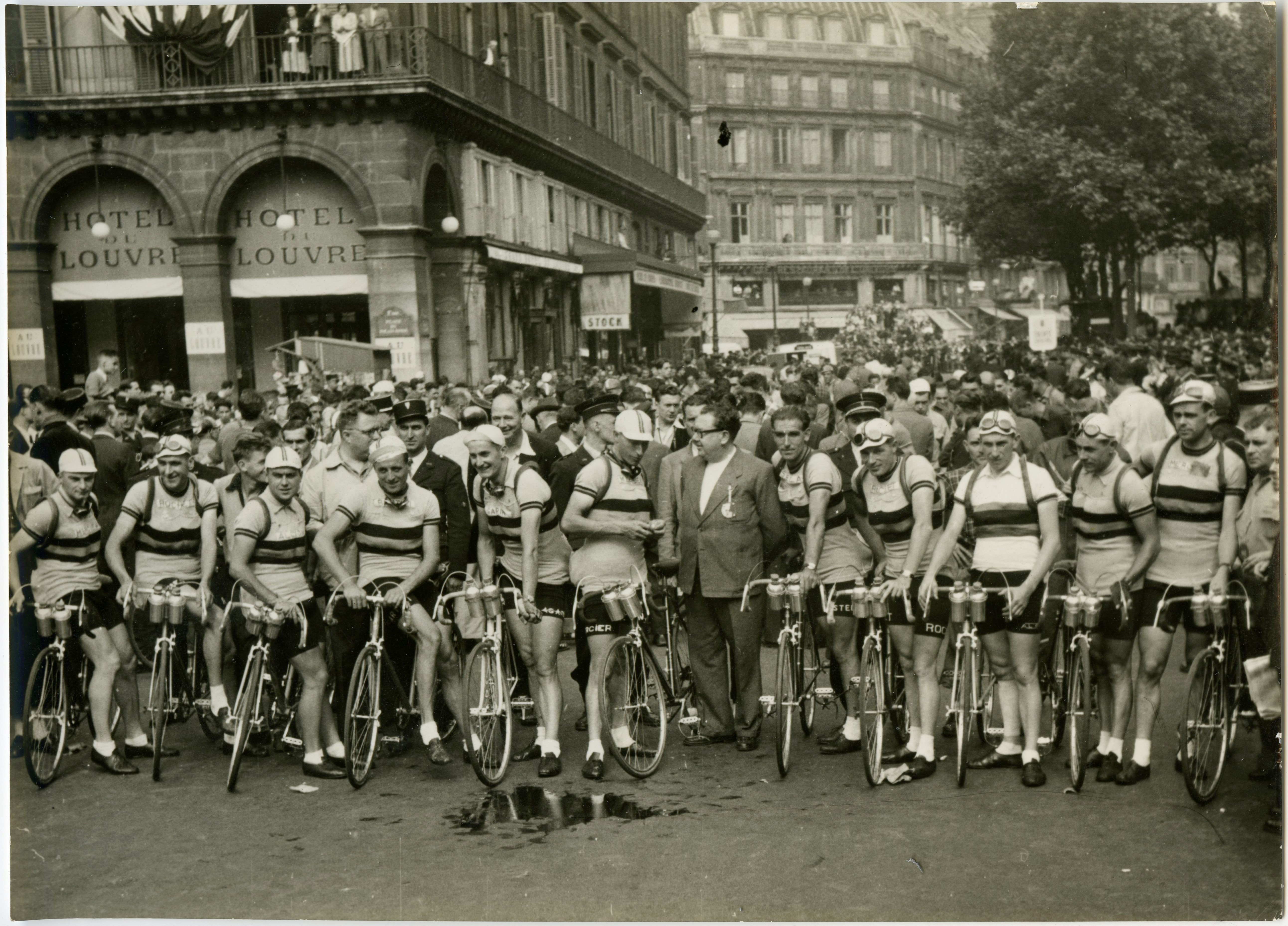 De Belgische Tourploeg in 1949. Dat jaar wordt de selectie voor de Ronde van Frankrijk om onduidelijke redenen uitgesteld, waardoor Dwars door België begin mei met argusogen gevolgd wordt. Briek Schotte wordt in eerste instantie niet weerhouden voor de Tour, maar onder massaal protest wordt hij toch nog opgenomen in de selectie. Hij eindigt als 33ste in Parijs. Raymond Impanis moet opgeven.